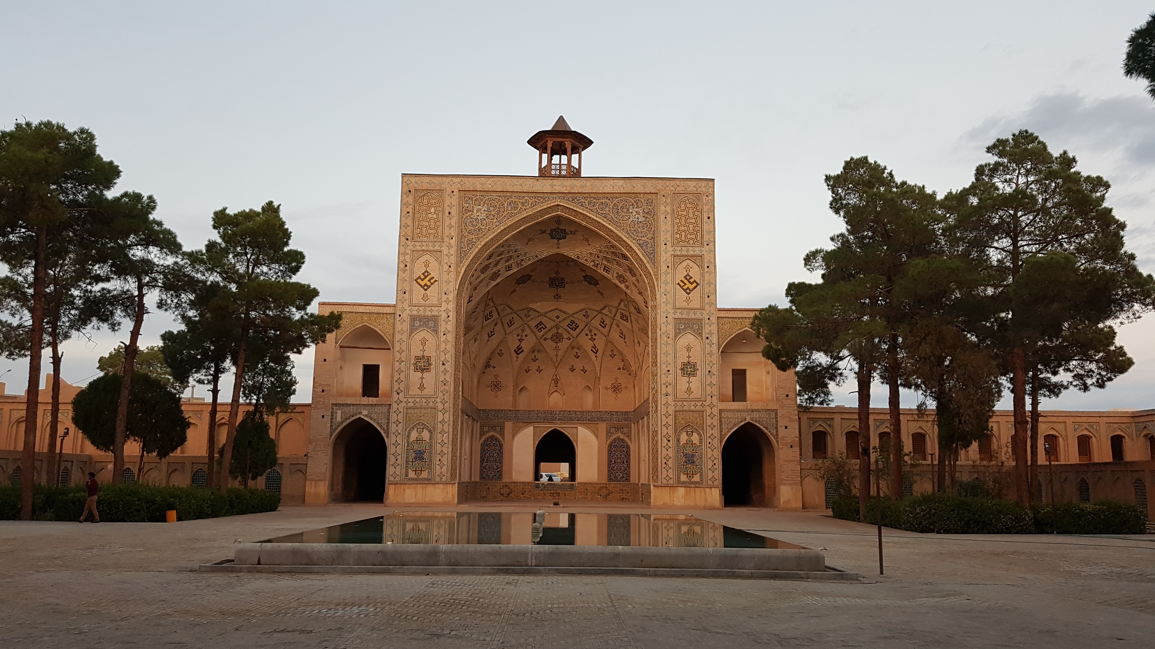 مسجد شاه/ مسجد سلطانی